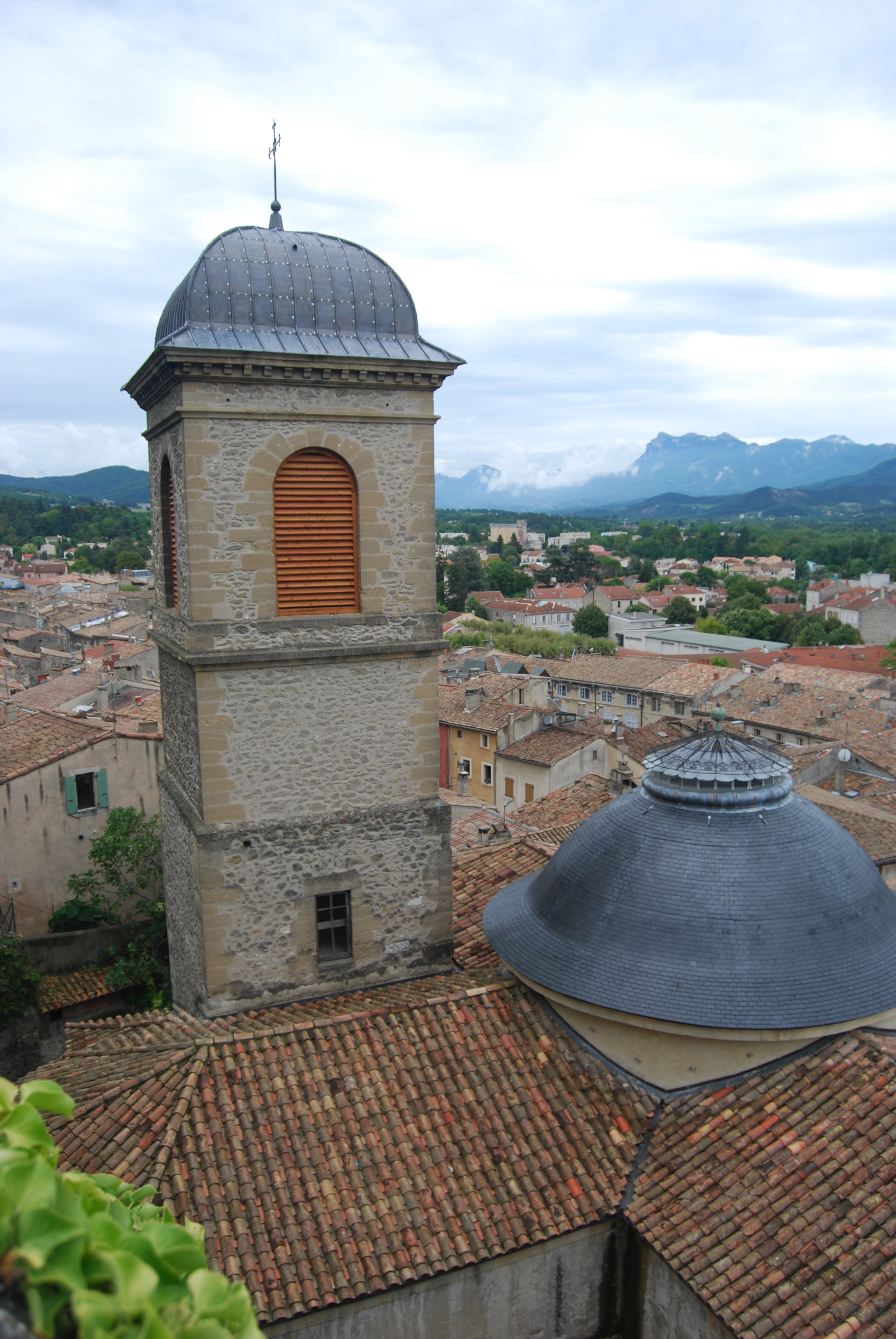 Clocher et une partie de l'église.